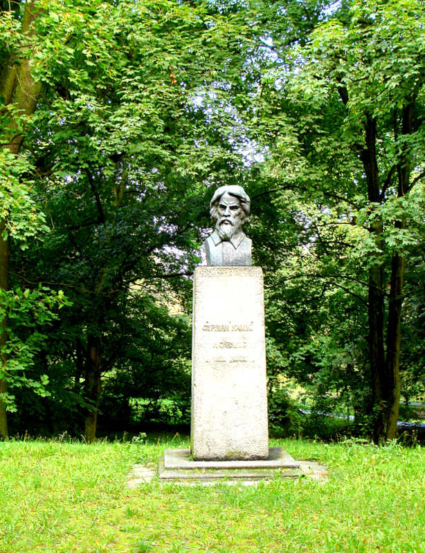 Koszalin, popiersie Cypriana Kamila Norwida, popiersie autorstwa Ferdynanda Jarocha